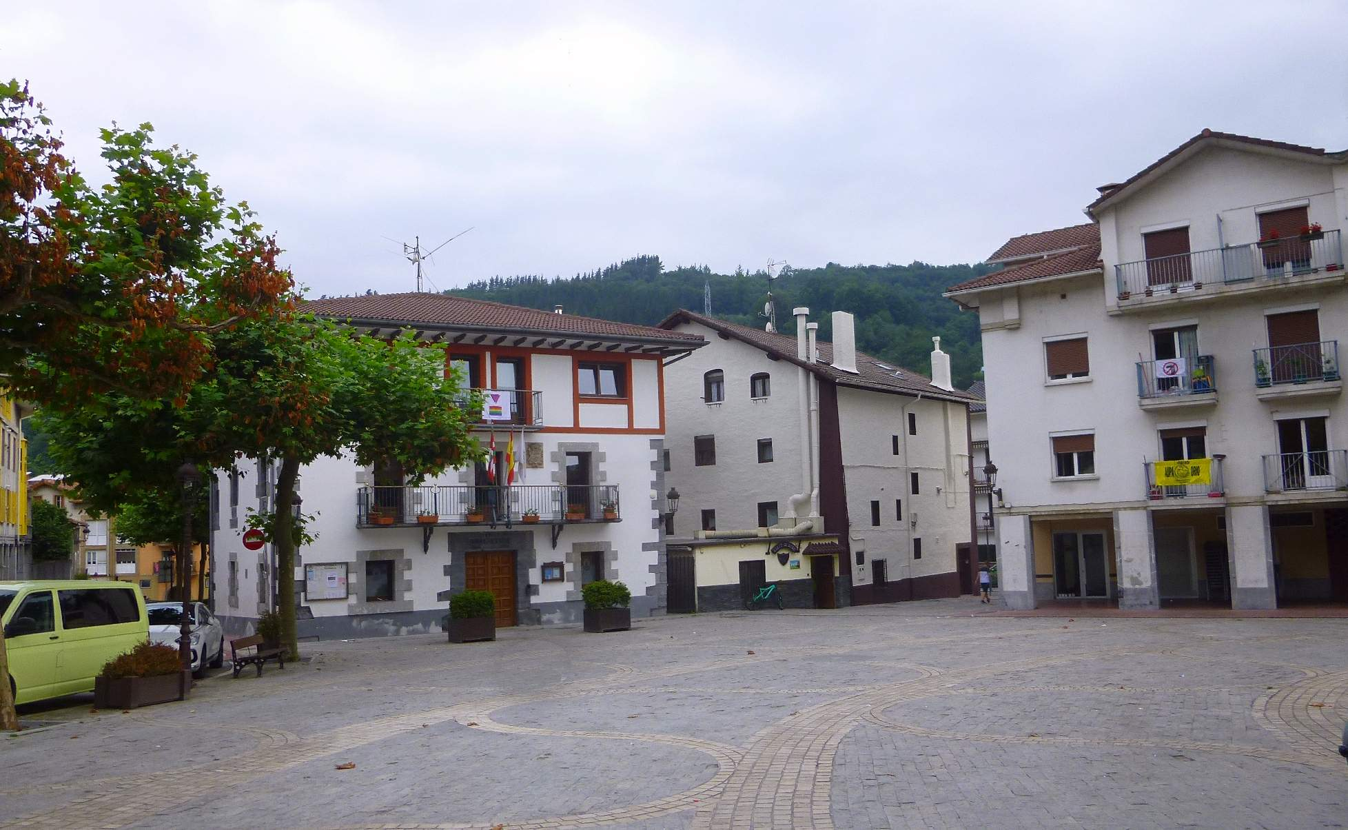 Irura (Guipúzcoa)